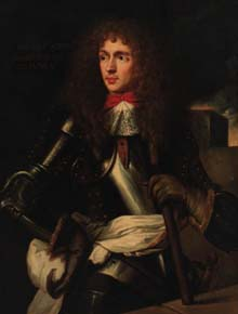 Armand Nompar II de Caumont (1679-1764), marquis de Boësse, marquis puis duc de La Force (1727)